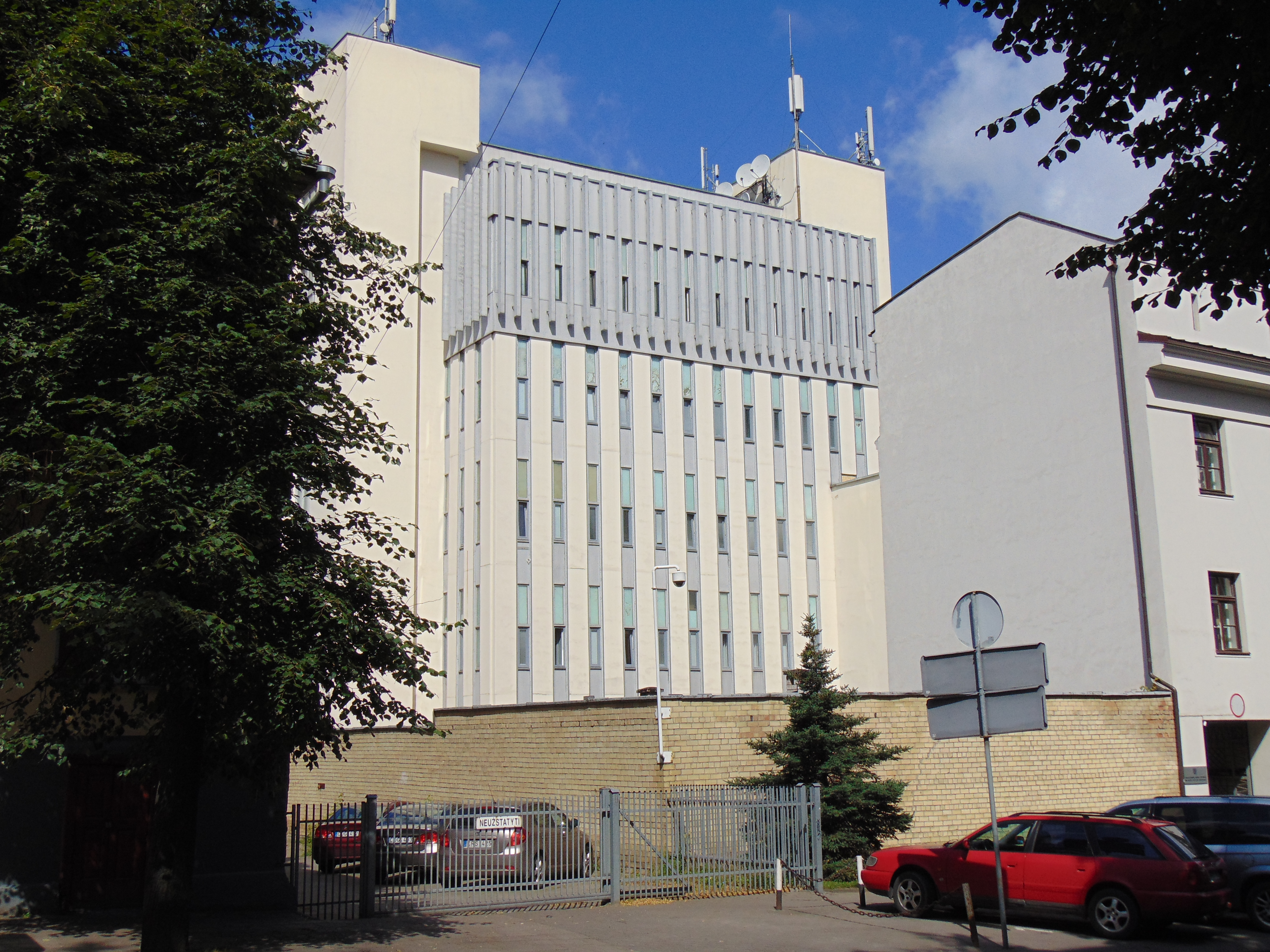 Vyriausybinių ryšių centras